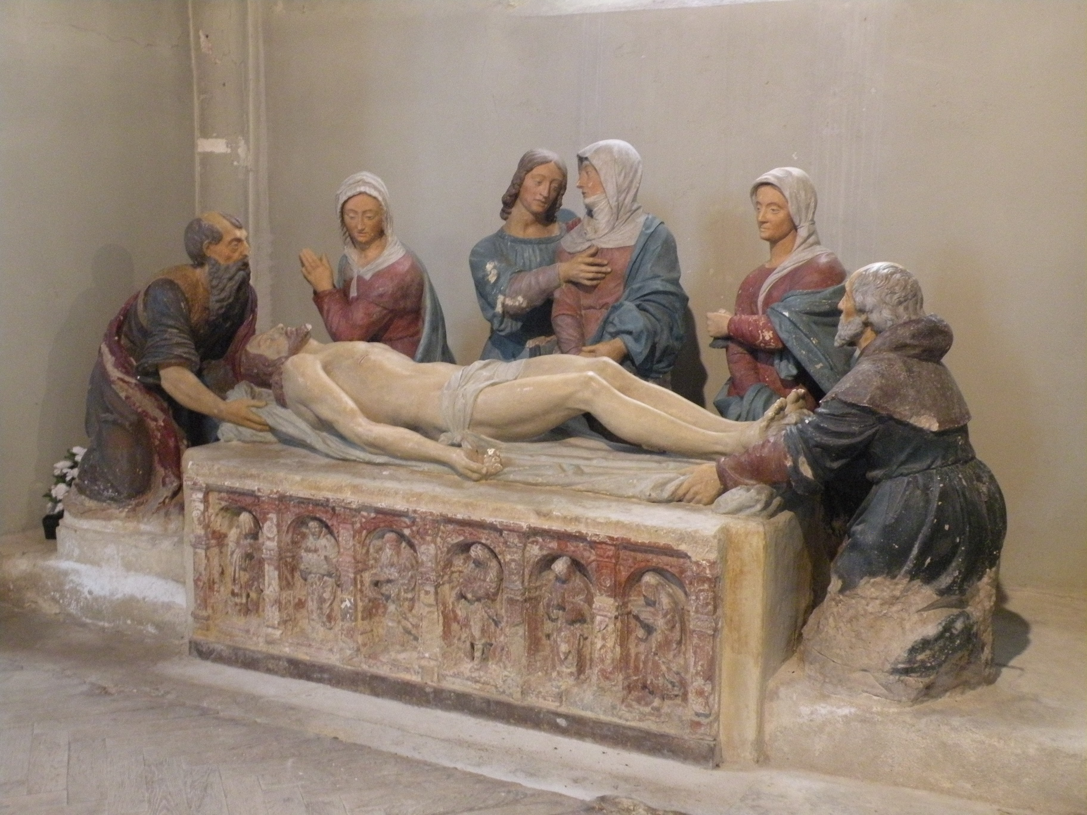 Église Saint-Lucien de Méru mise au tombeau